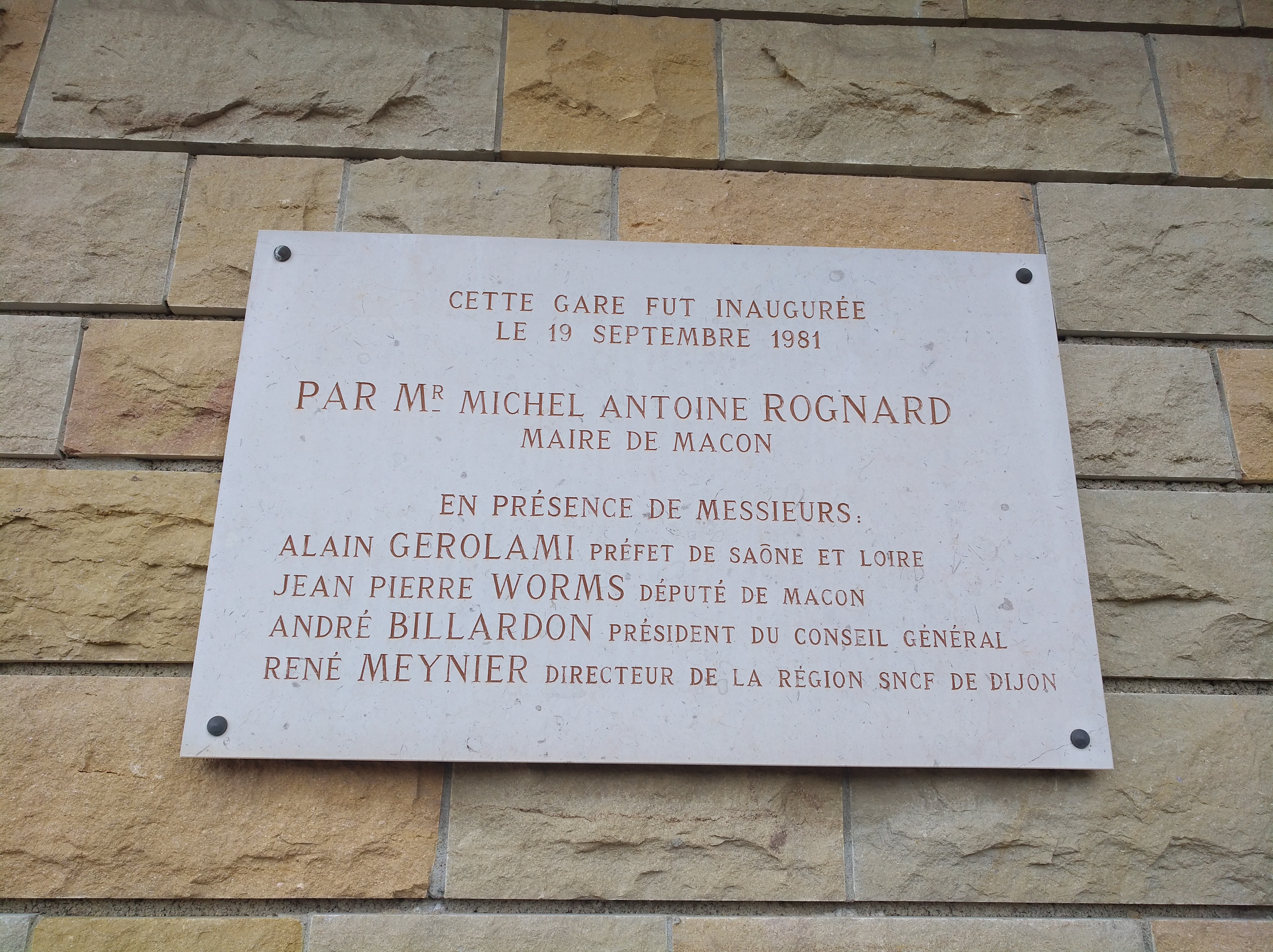 Plaque commémorant l'inauguration de la gare de Mâcon-Loché TGV, en Saône-et-Loire, le 19 septembre 1981.